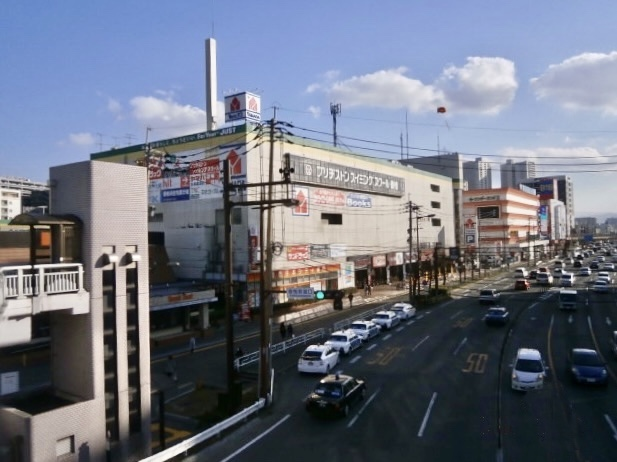 2013年2月23日撮影。